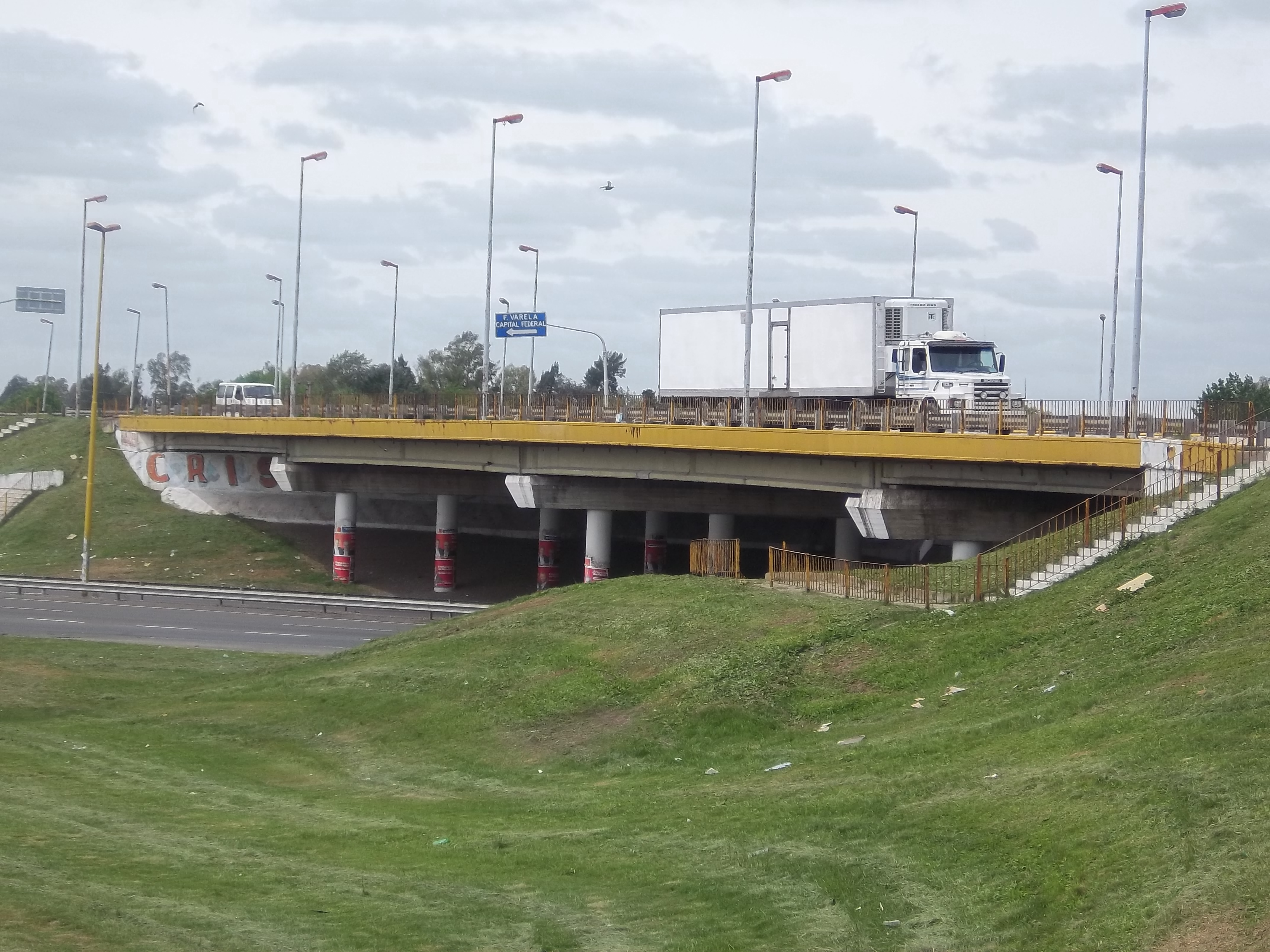 Distribuidor Etcheverry con el puente de la Ruta Provincial 215 sobre la Autovía 2 en Ángel Etcheverry, partido de La Plata, provincia de Buenos Aires, Argentina.